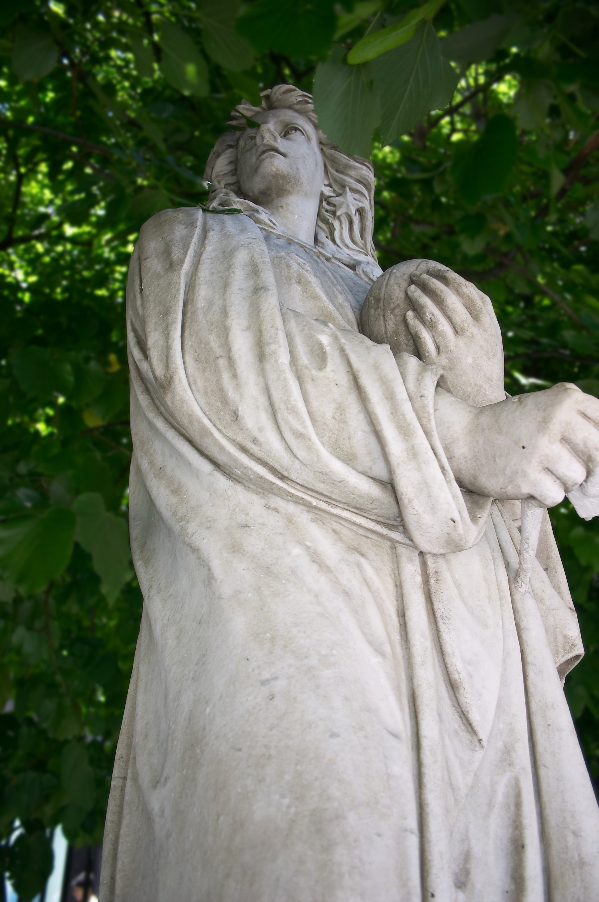 Estatua de la Astronomía cuando estaba aun en la Plazoleta San Francisco, Buenos Aires, Argentina. Esquina de Defensa y Alsina, Barrio de Monserrat.